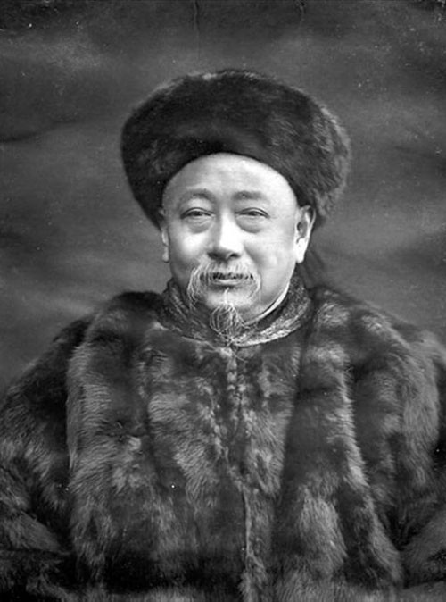 Guo Songtao (1818-91)